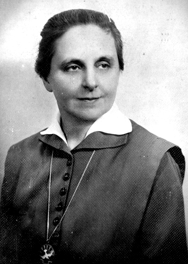 Slachta Margit (Kassa, 1884. szeptember 18. – Buffalo, USA, 1974. január 6.) magyar szerzetes, feminista politikus, az első magyar női országgyűlési képviselő.